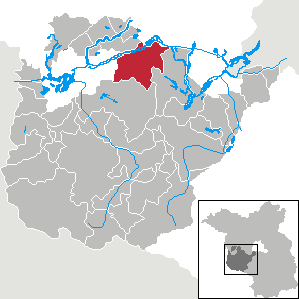 Groß Kreutz (Havel) in Brandenburg (Country) - District Potsdam-Mittelmark